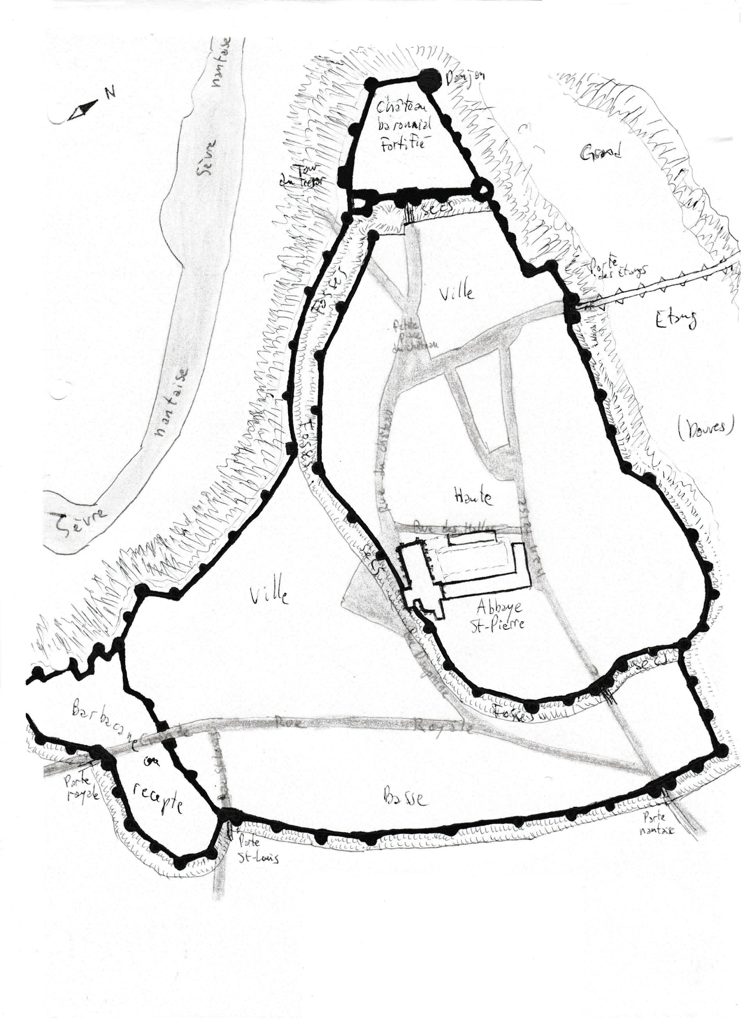 Plan à l'échelle présentant un plan possible des remparts médiévaux de Mortagne-sur-Sèvre, à partir du cadastre napoléonien de 1844.